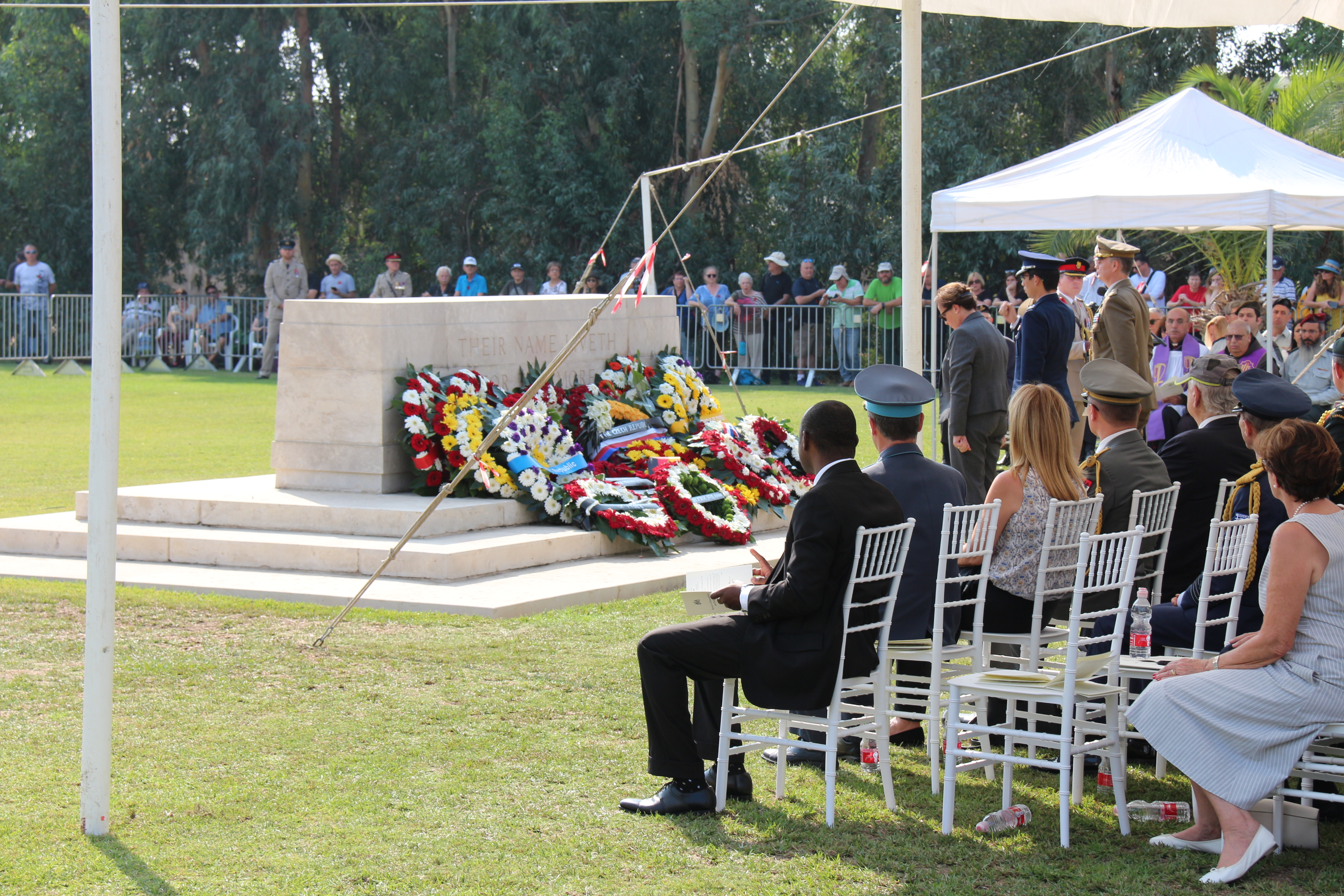 טקס הזיכרון לחללי הממלכה הבריטית 10.11.2019